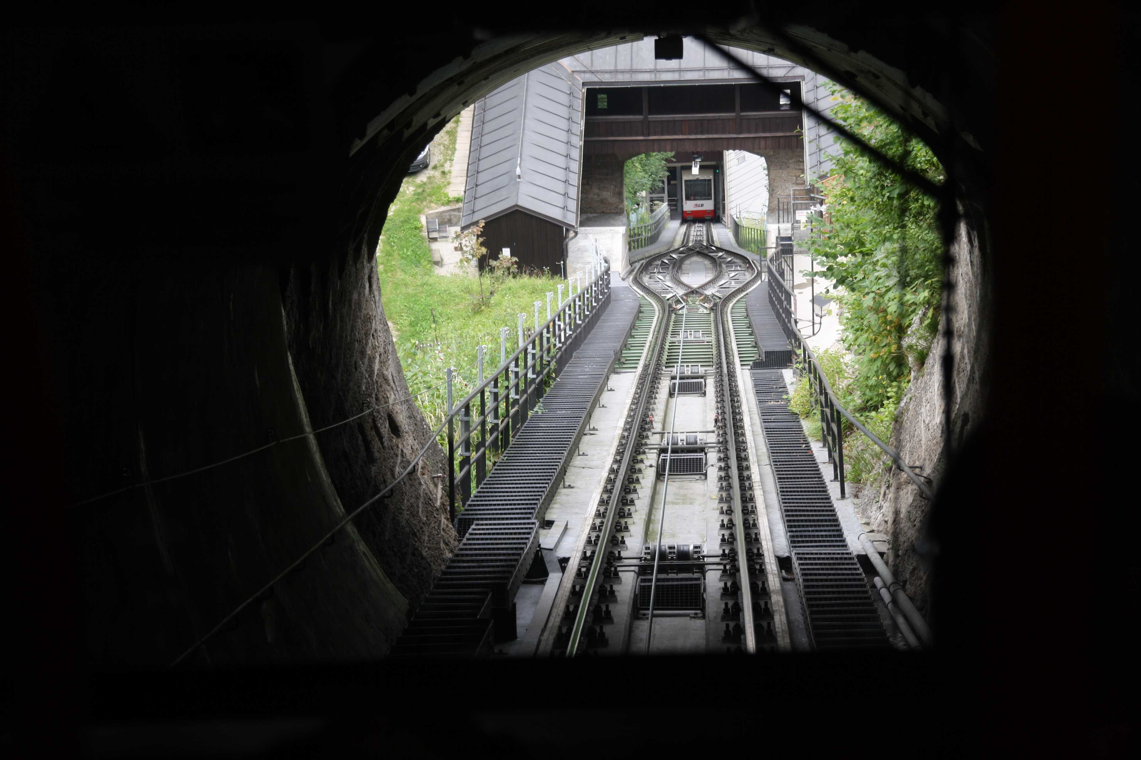 Festungsbahn Salzburg Blick aus dem links laufenden Wagen von oben auf die Ausweiche